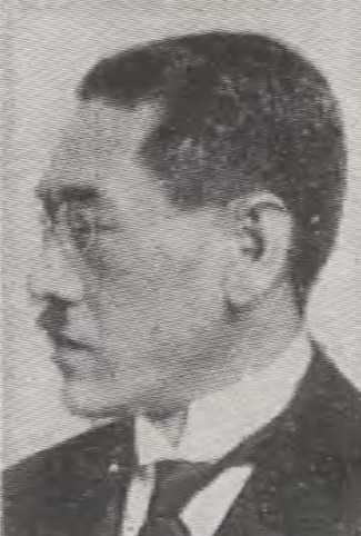 毛利元恒子爵（1890～1966）